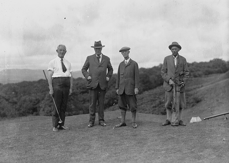 Ffotograffydd/Photographer: P B Abery (1877?-1948) Dyddiad/Date: [193-?] Cyfrwng/Medium: Negydd gwydr / Glass negative Maint/Dimensions: 119 x 163 mm. Cyfeiriad/Reference: PBA78/22 (pba01625) Rhif cofnod / Record no.: 4543417 Rhagor o wybodaeth am gasgliad P B Abery yn Llyfrgell Genedlaethol Cymru More information about the P B Abery Collection at the National Library of Wales